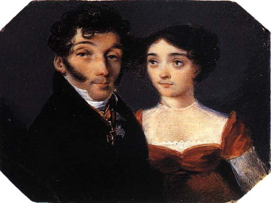 Озеровы Семен Николаевич и Анастасия Борисовна (конец 1810-х – начало 1820-х)